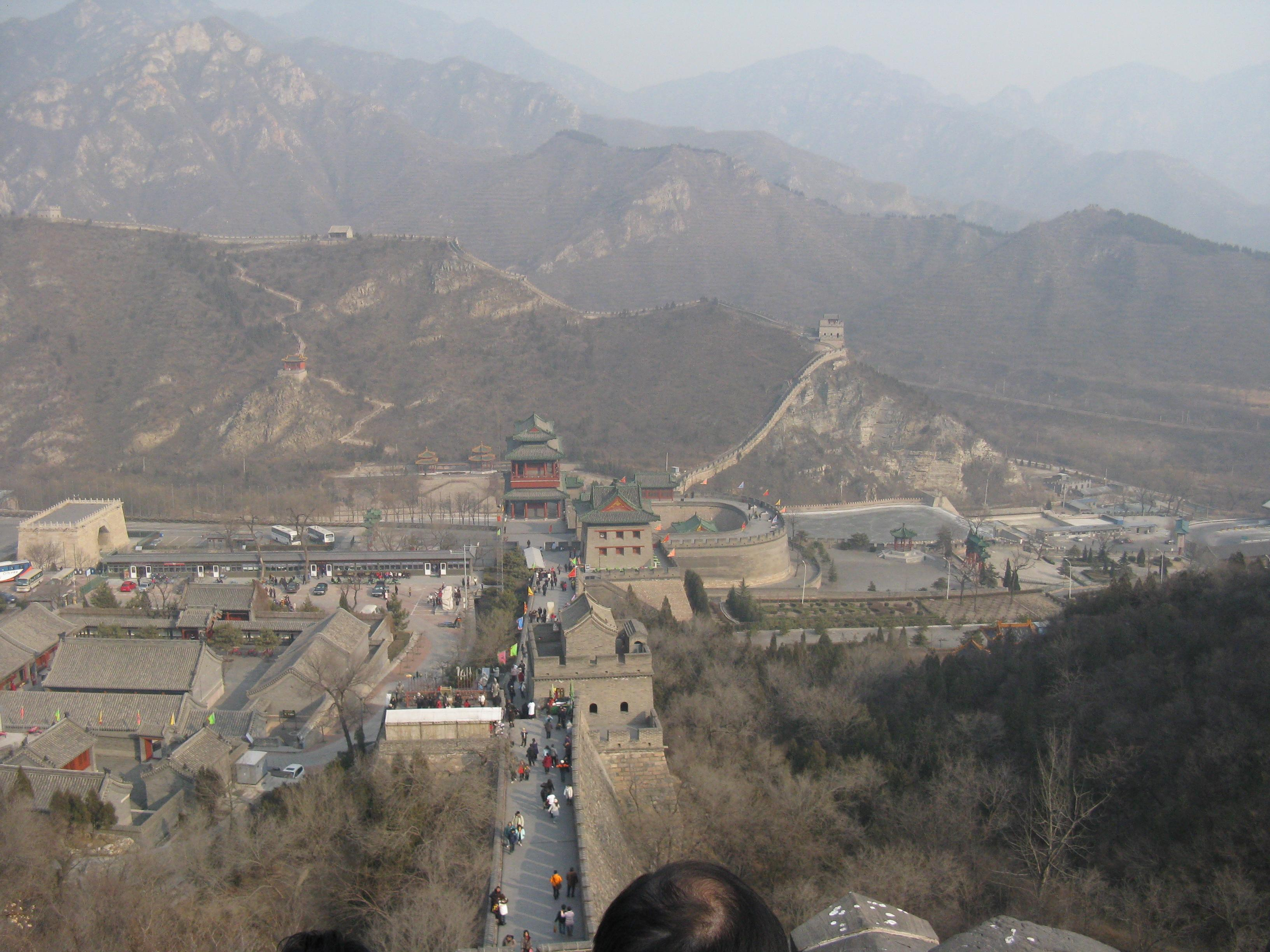 居庸關向下仰望